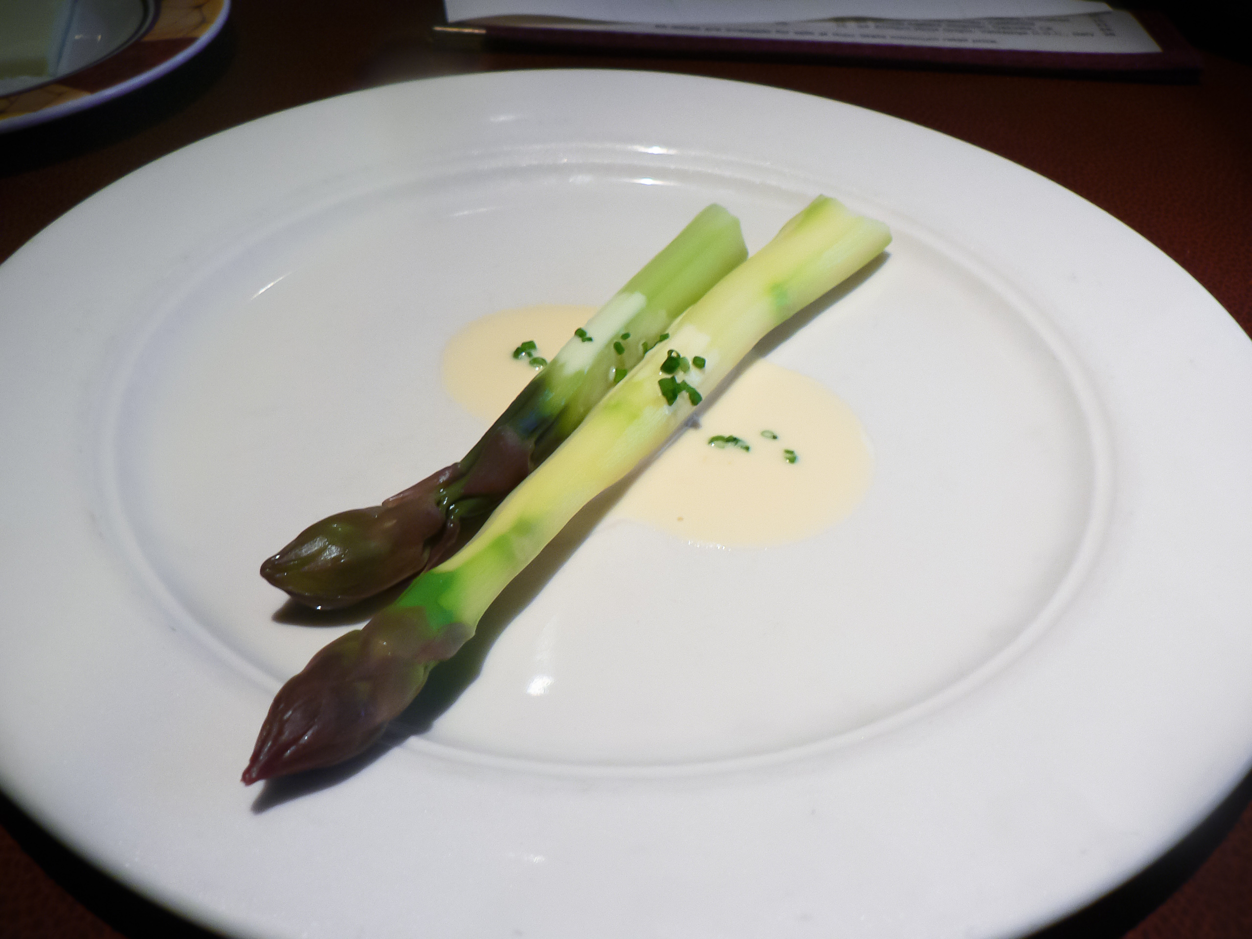 Purple Asparagus in Beurre blanc sauce